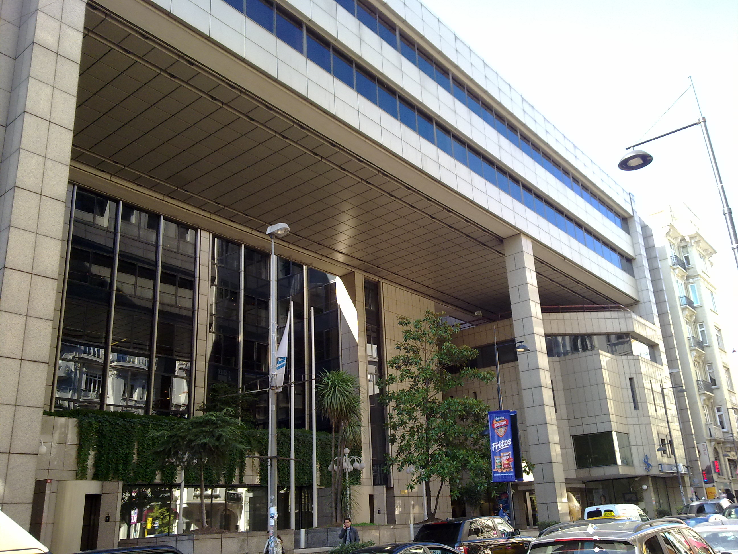 Millî Reasürans'ın Şişli Teşvikiye'de bulunan merkez binası